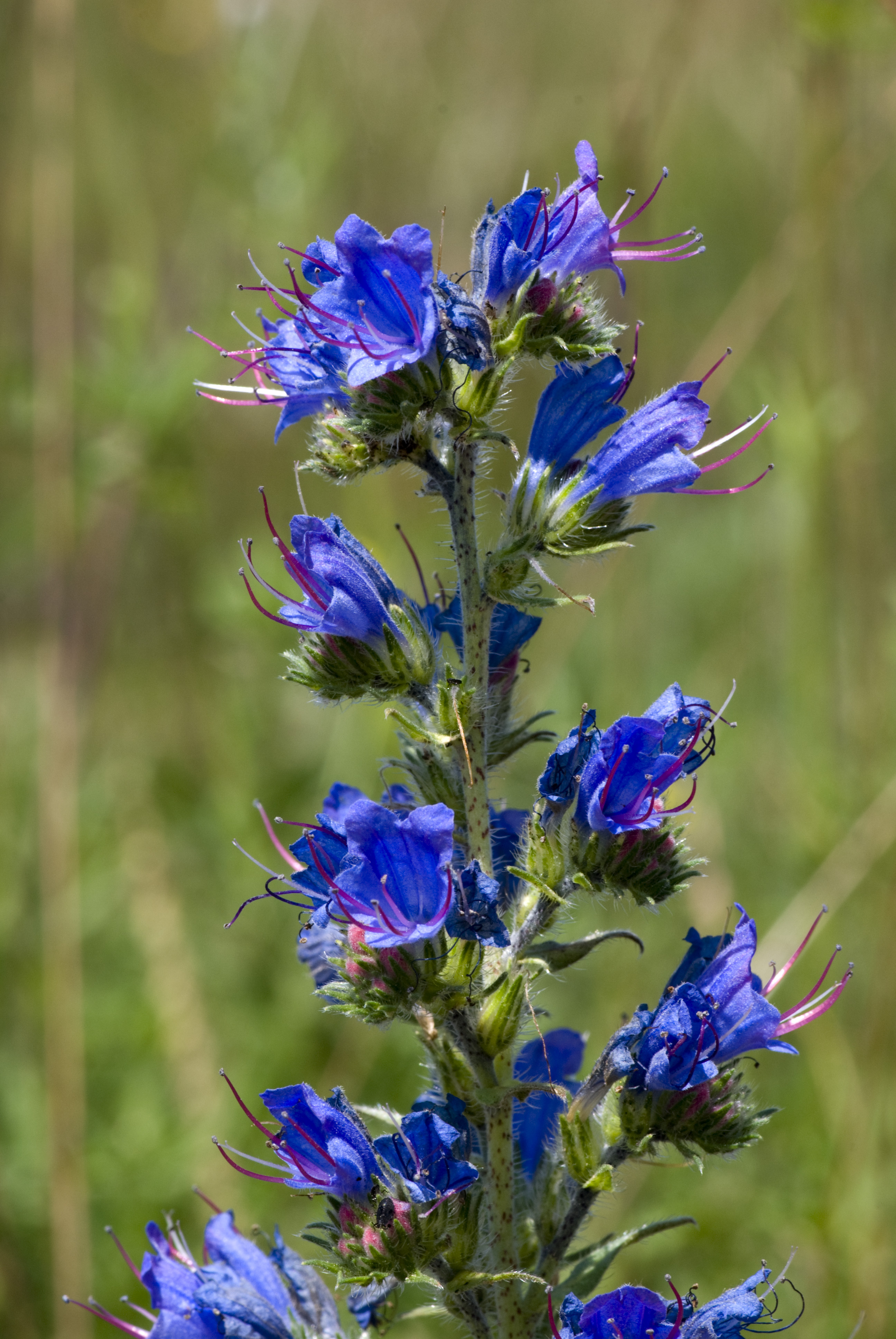 Echium vulgare Bethisy-Saint-Martin (Oise), France